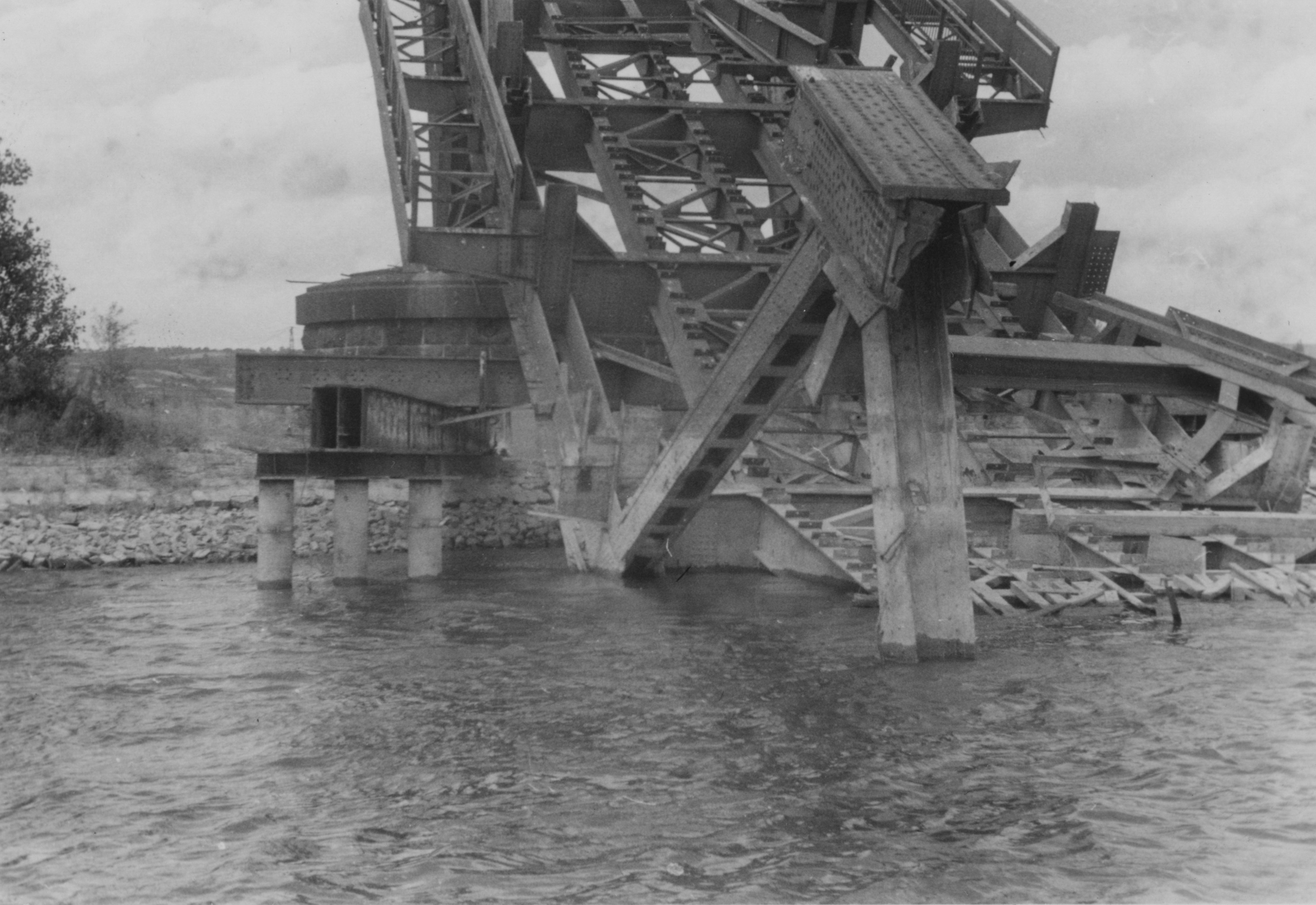 Originalbeschreibung: "Zerstörte Eisenbahnbrücke Rüdesheim/Rhein - Die 1915 in Betrieb genommene 1175 m lange (zwei Gewölbereihenbrücken im Vorland, 714 m lange Stahlbrücke im Strombereich) wurde am 13.01.1945 (Vorbrücke) und 15.03.1945 (Hauptbrücke) durch die deutsche Wehrmacht zerstört. Die Trümmer der Strombrücke wurden ab 1948 geborgen, die Pfeiler (1967) und die Widerlager (1970) später abgebrochen. Das Bild zeigt Restarbeiten am Überbau D."